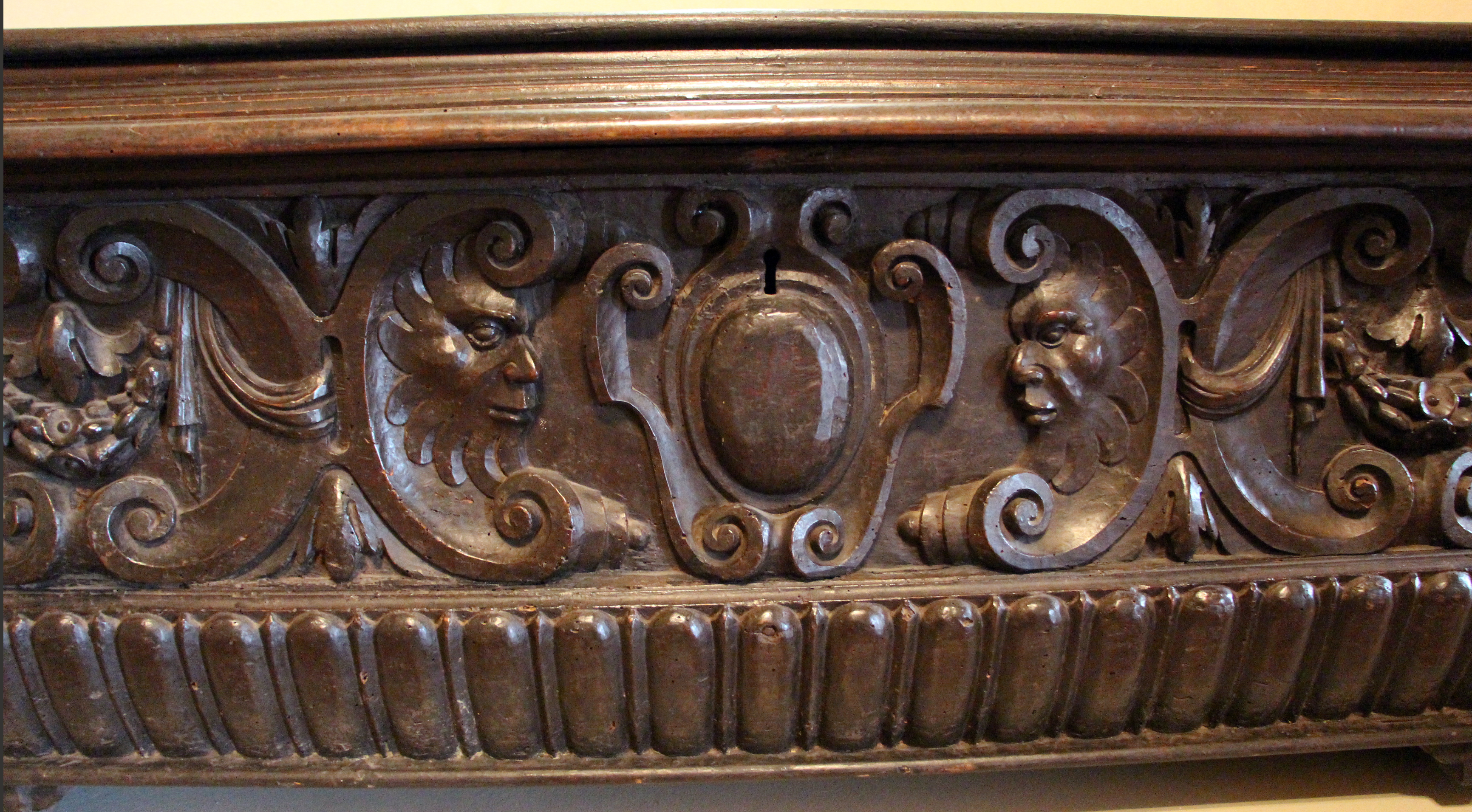 Villa medicea di Cerreto Guidi - MIBAC The making of this document was supported by Wikimedia CH. (Submit your project!) For all the files concerned, please see the category Supported by Wikimedia CH. This is a photo of a monument which is part of cultural heritage of Italy.